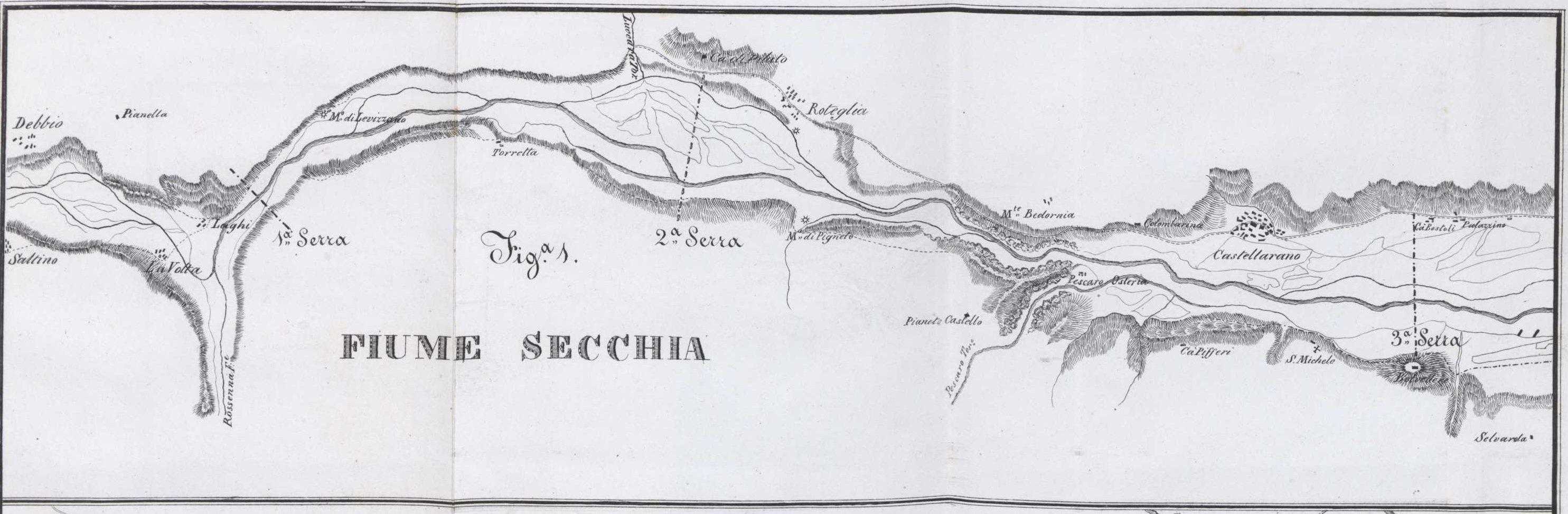 Fiume Secchia tratto da Delle serre o traverse nei torrenti-fiumi lombardi precedenti dagli Apennini